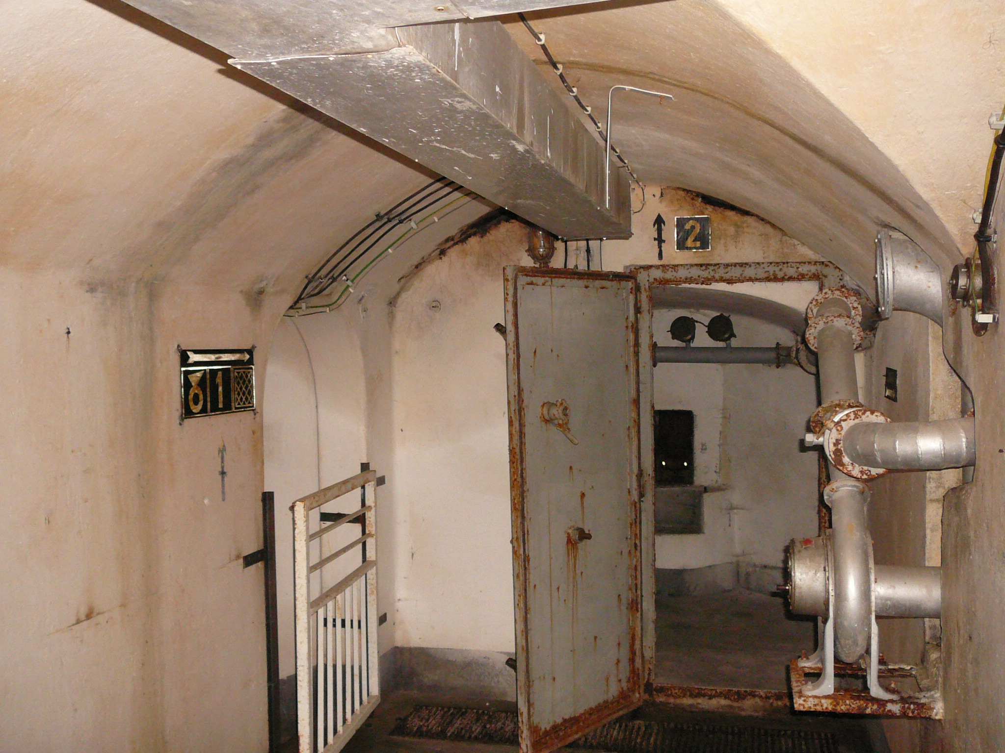 opera 5, sbarr drava